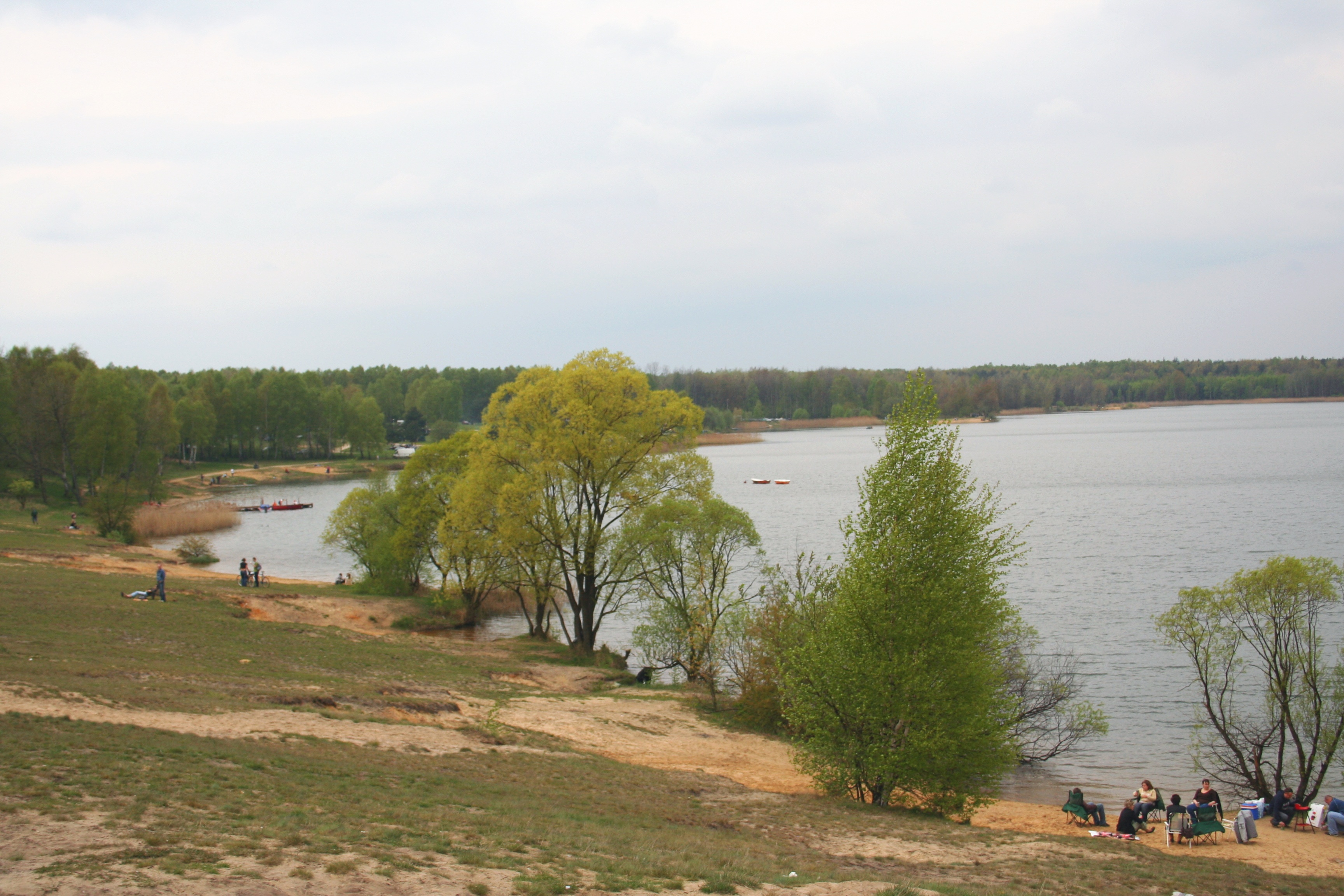 Zalew Chechło - zbiornik w wodny, Polska, województwo śląskie, powiat tarnogórski